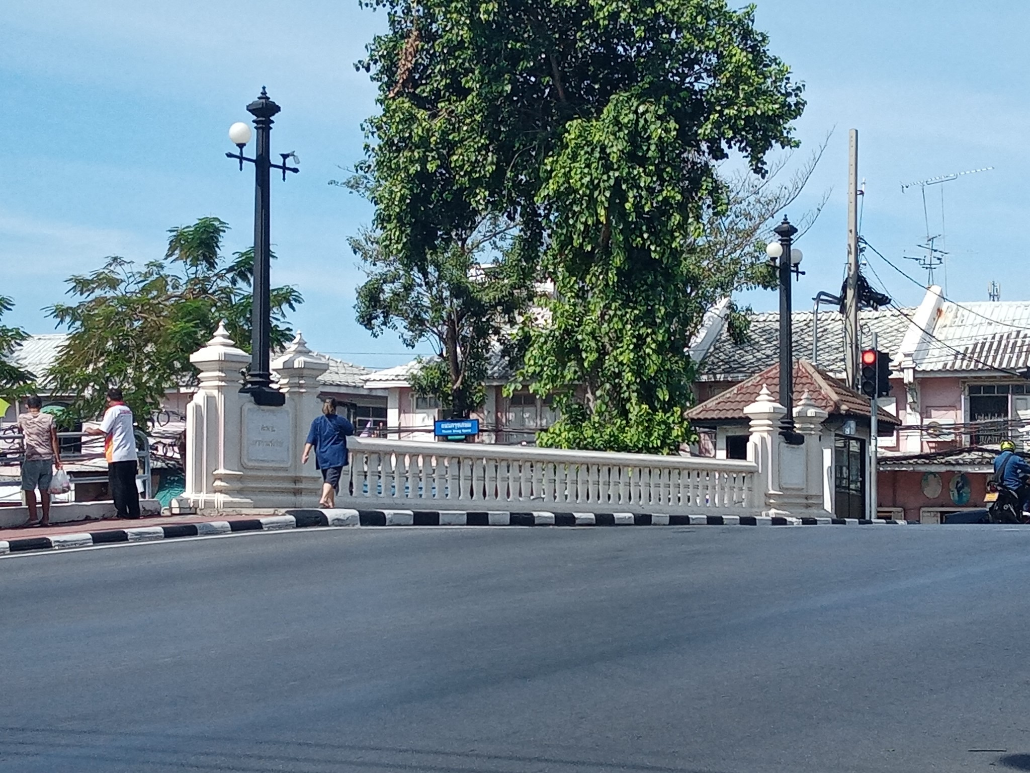 สะพานเทวกรรมรังรักษ์ หนึ่งในสะพานข้ามคลองผดุงกรุงเกษม และเป็นหนึ่งในห้าสะพานชุด "สะพานที่สร้างโดยเทวดา"